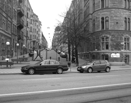 Grevgatan i Stockholm